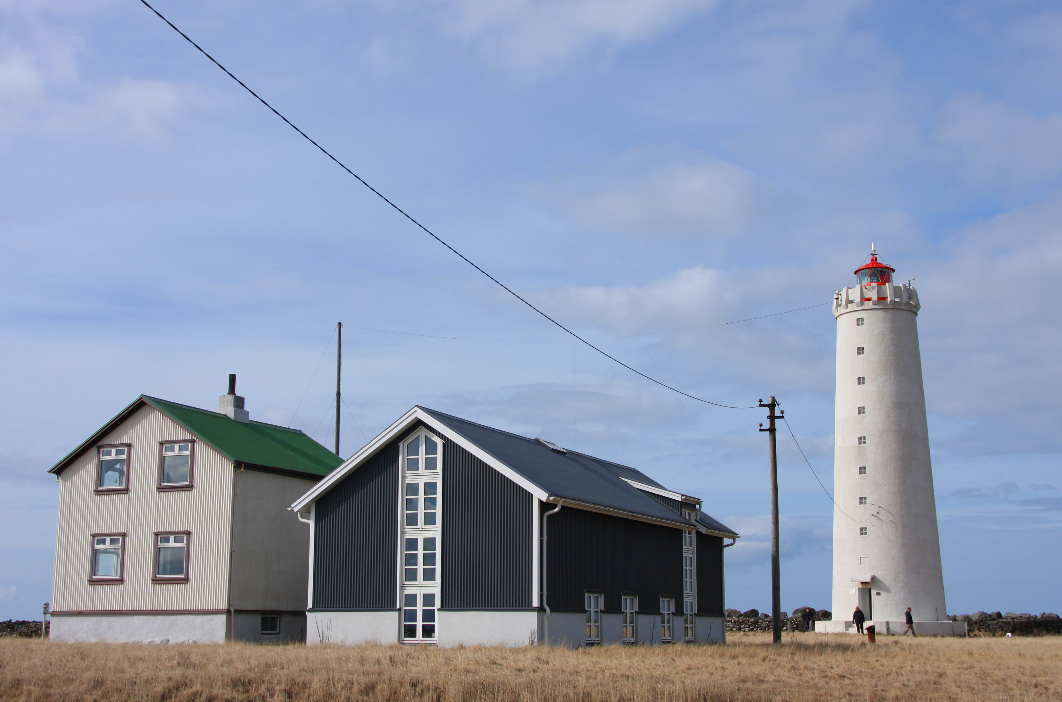 Leuchtturm Grótta in Seltjarnarnes